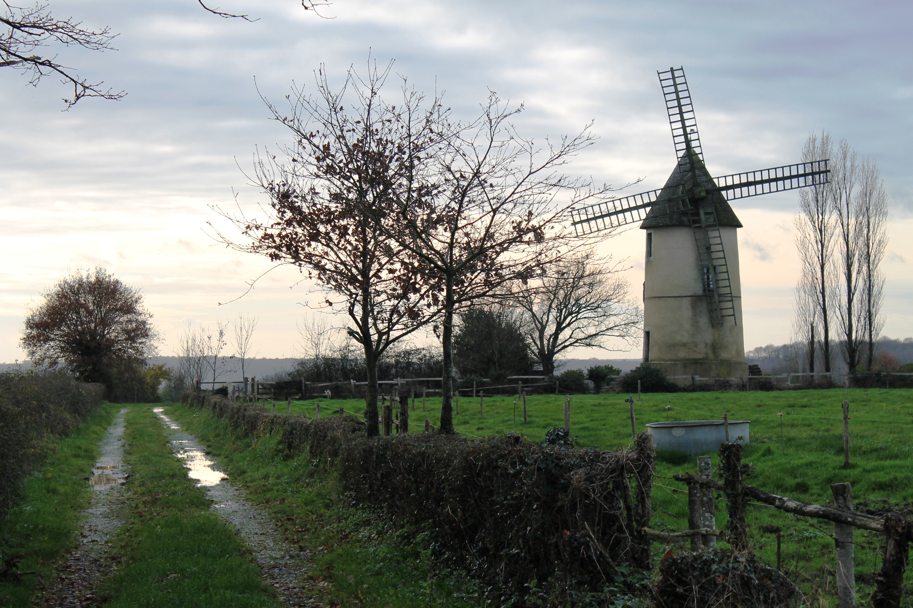 Moulin à vent de Saint-Cyr-des-Gâts